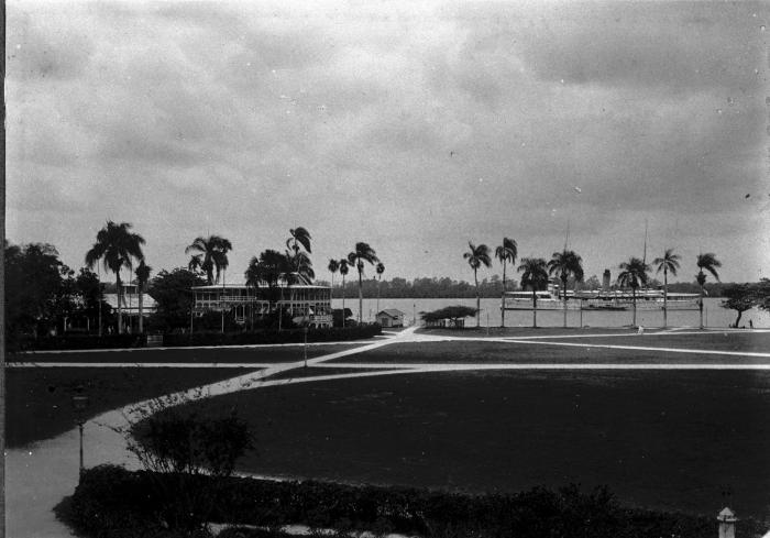 Foto. Het Gouvernementsplein in Paramaribo.